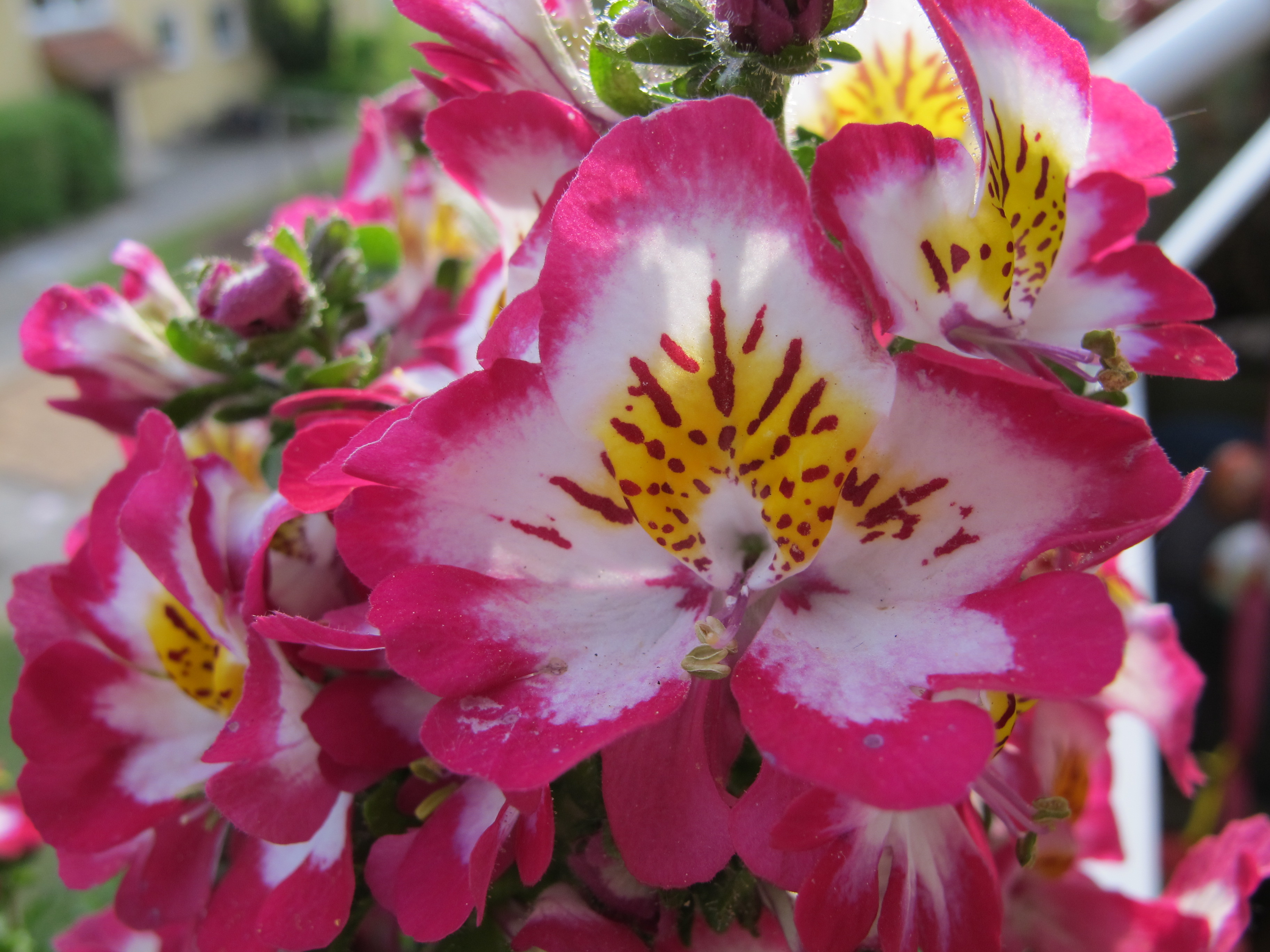 Blüte einer Bauernorchidee - Schizanthus wisetonensis